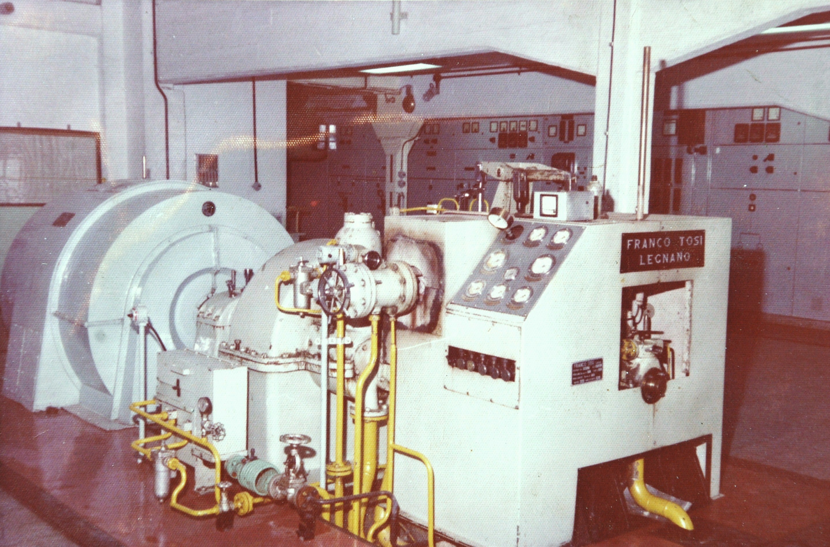 Alternador Marelli acoplado a turbina a vapor Franco Tosi Legnano instalado en la usina de CAP Cuatreros